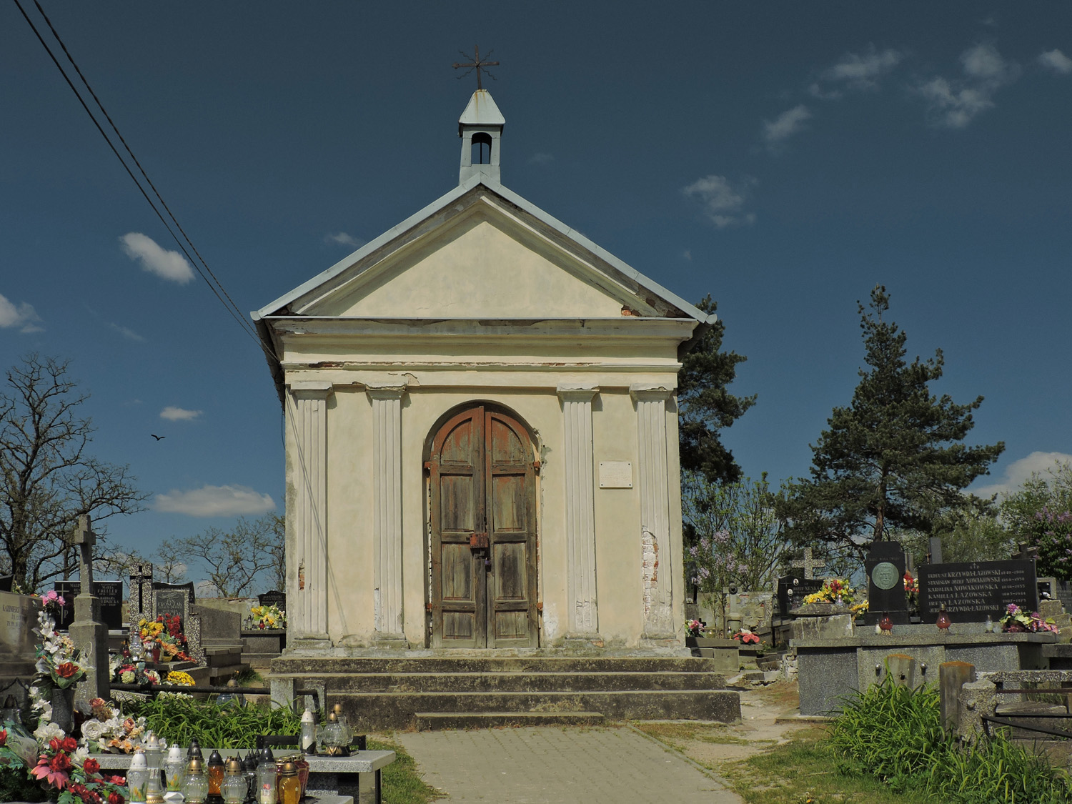 Grójec, kaplica grobowa rodziny Makowskich, 1851